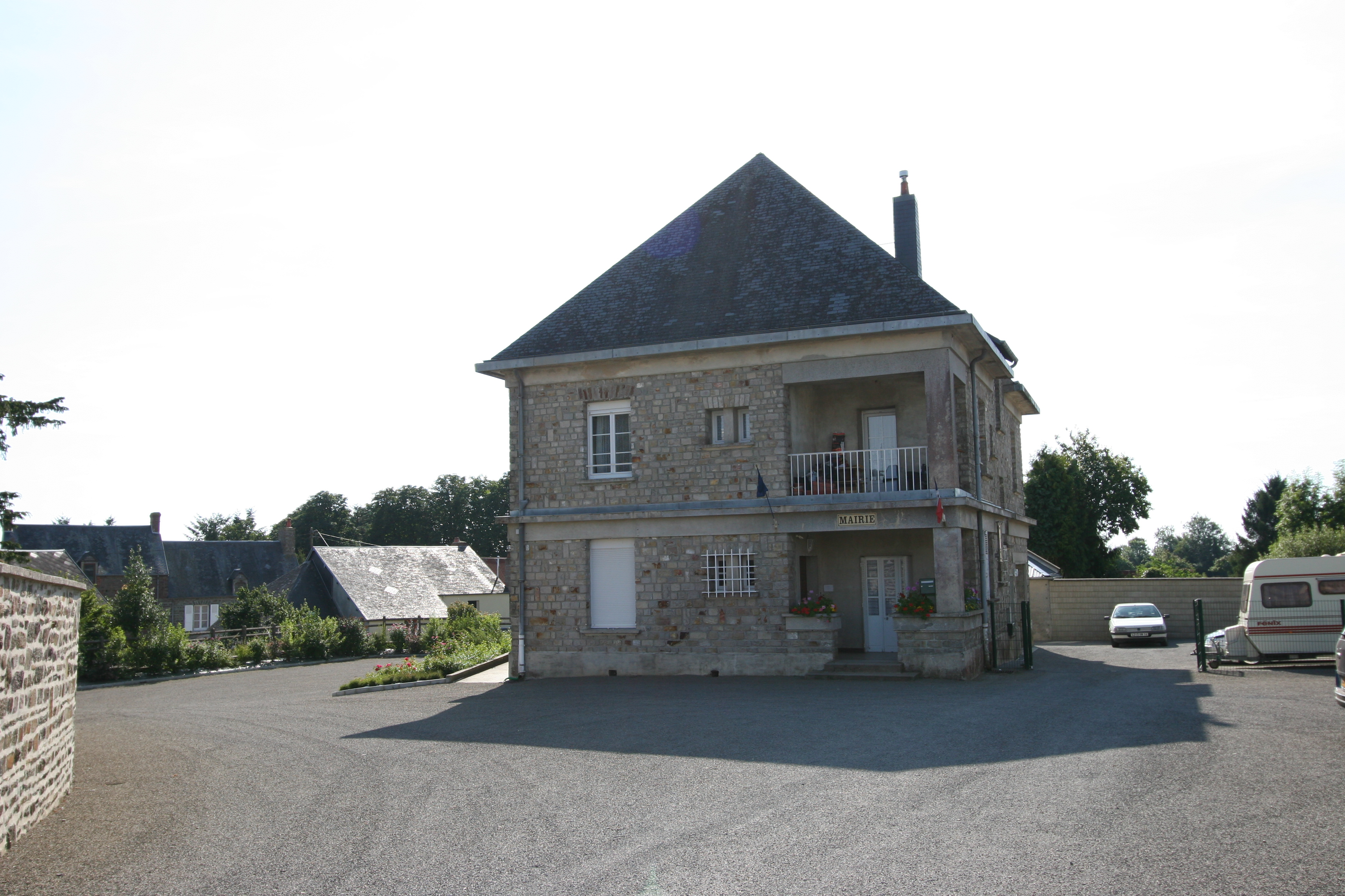 Mairie de Saint Pierre la Vieille, Calvados, France